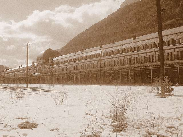 L'ancienne gare de Canfranc.